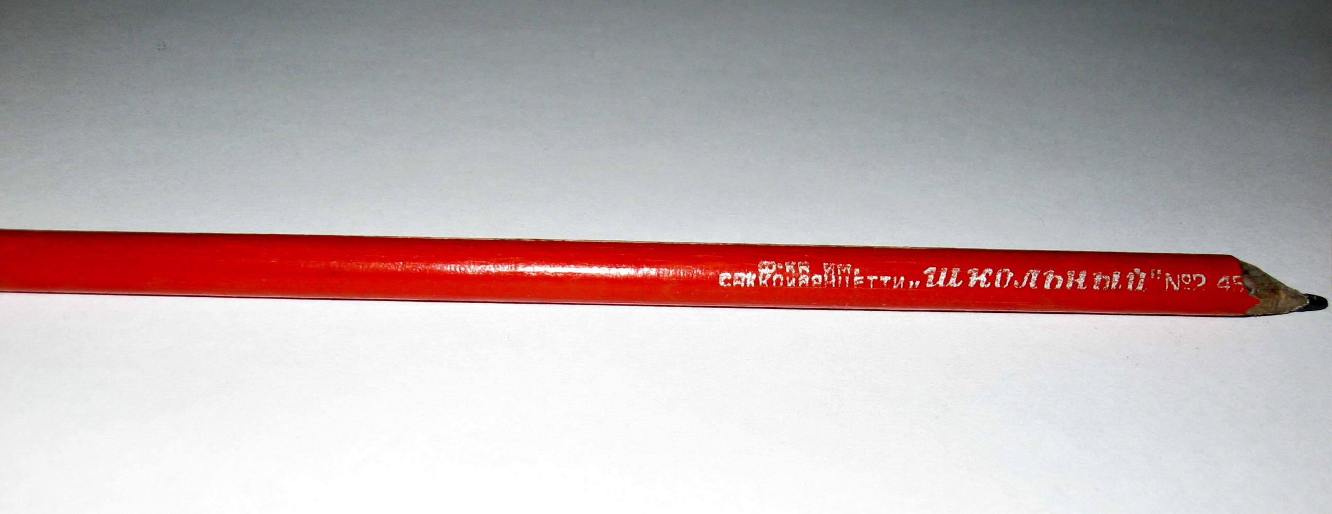 Карандаш "Школьный" фабрики им. Сакко и Ванцетти (1945 год)